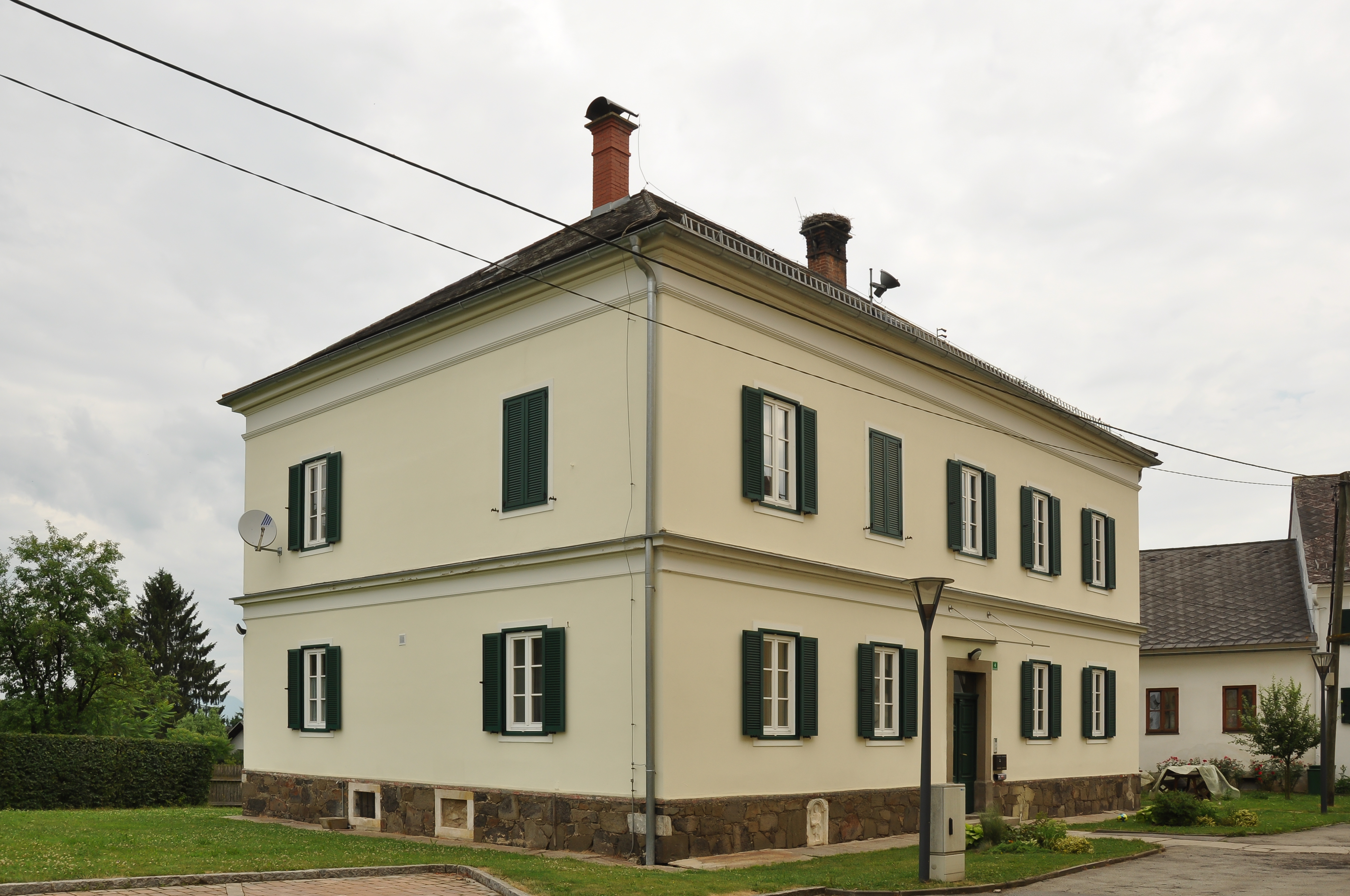 Pfarrhof